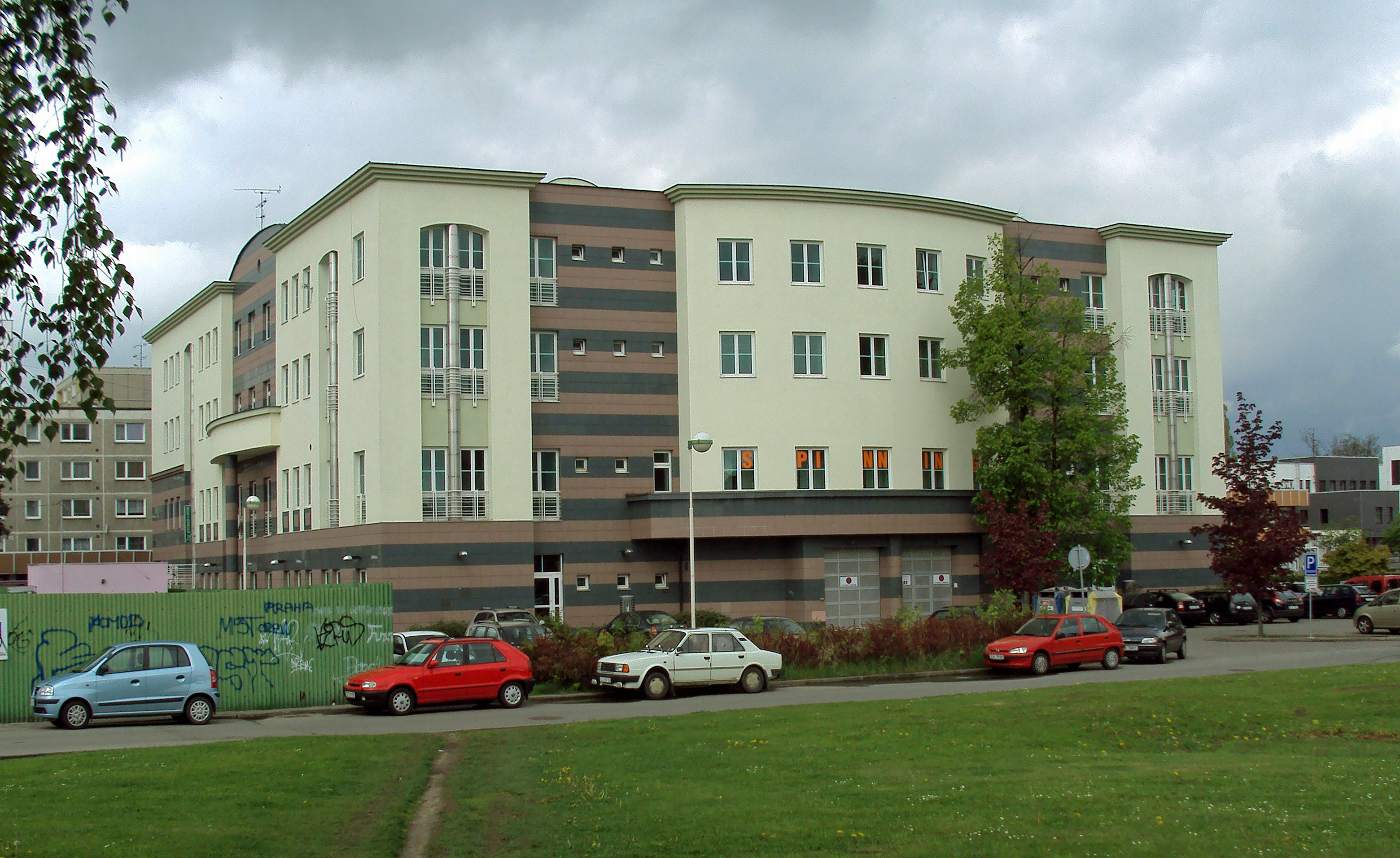 Budova České spořitelny v České Lípě, Hrnčířská ulice